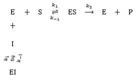 Ühe keskse kompleksiga konkureeriv inhibitsioon.